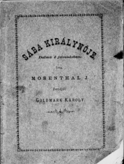 A Sába királynőjének első magyar nyelvű kiadása.